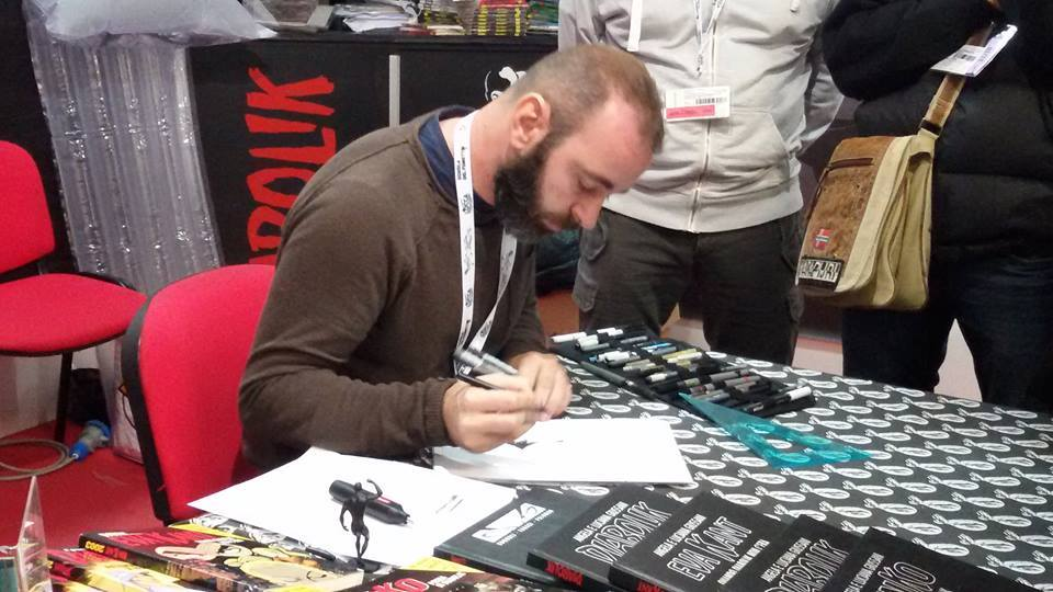 Riccardo Nunziati allo stand astorina